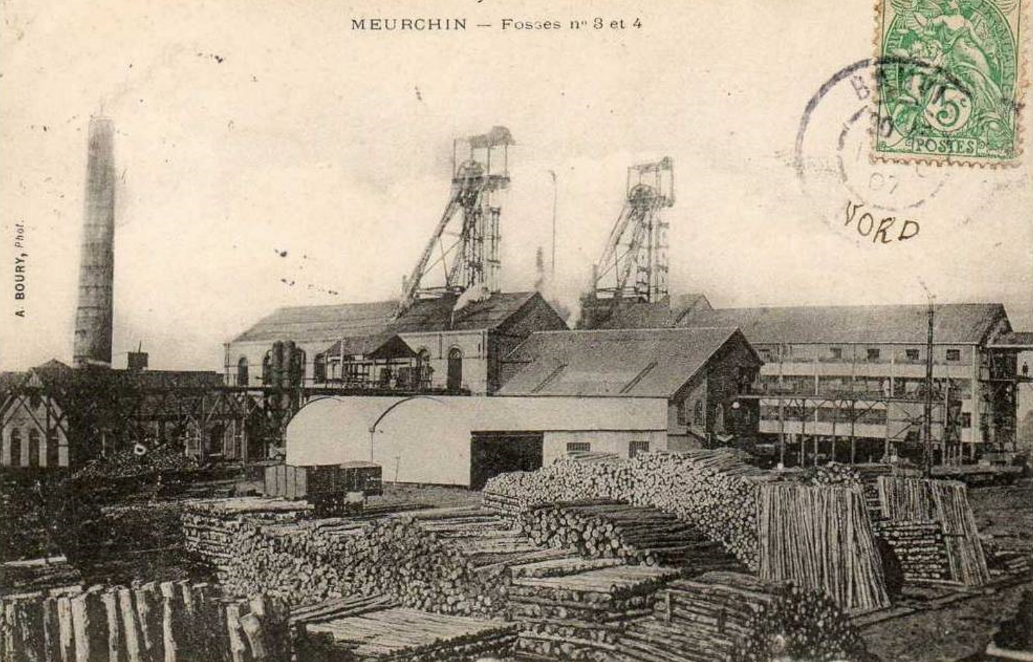 La Fosse n° 3 - 4 de la Compagnie des mines de Meurchin était un charbonnage constitué de deux puits situé à Wingles, Pas-de-Calais, Nord-Pas-de-Calais, France.